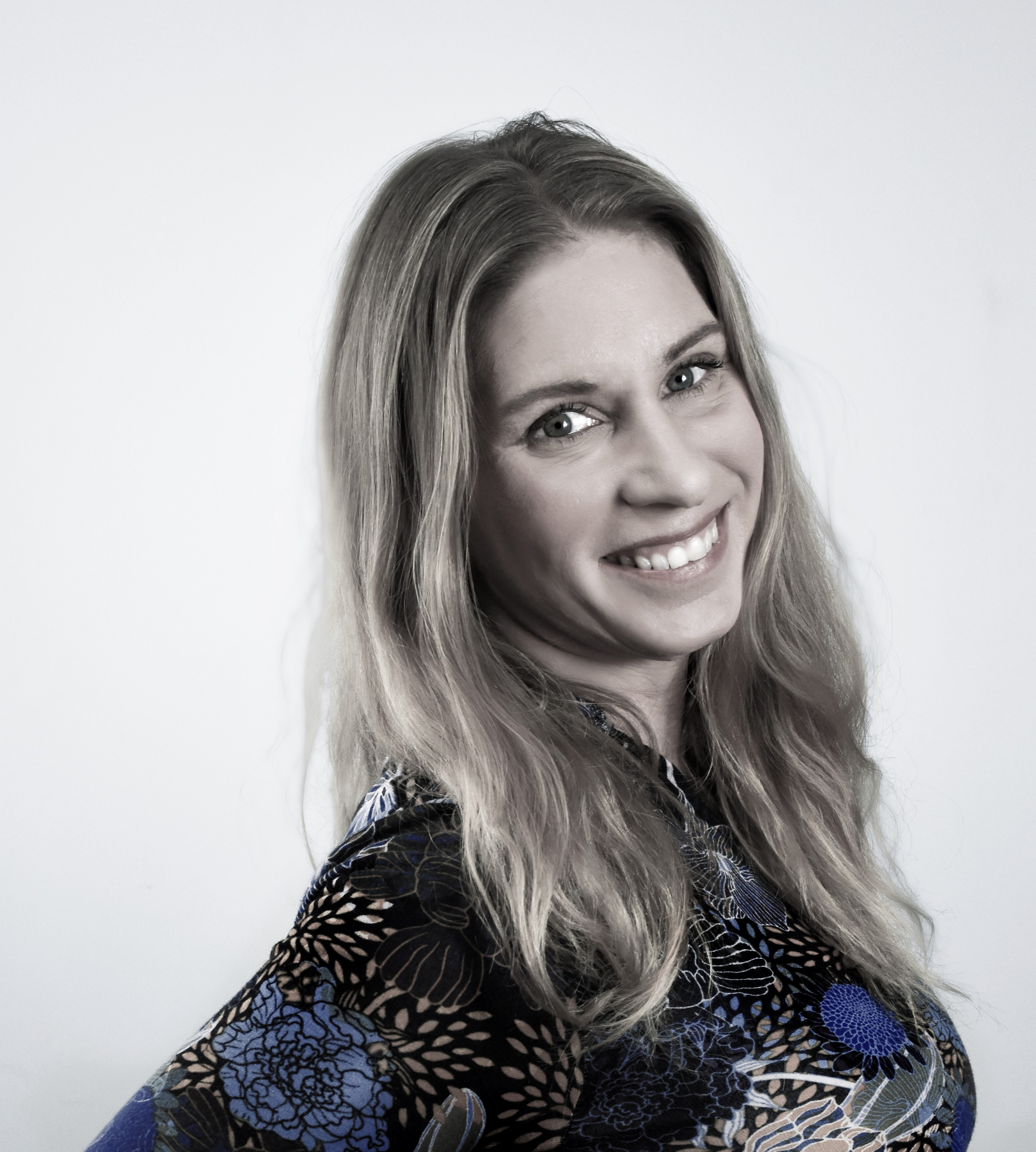 Carola Siekas Kostenius